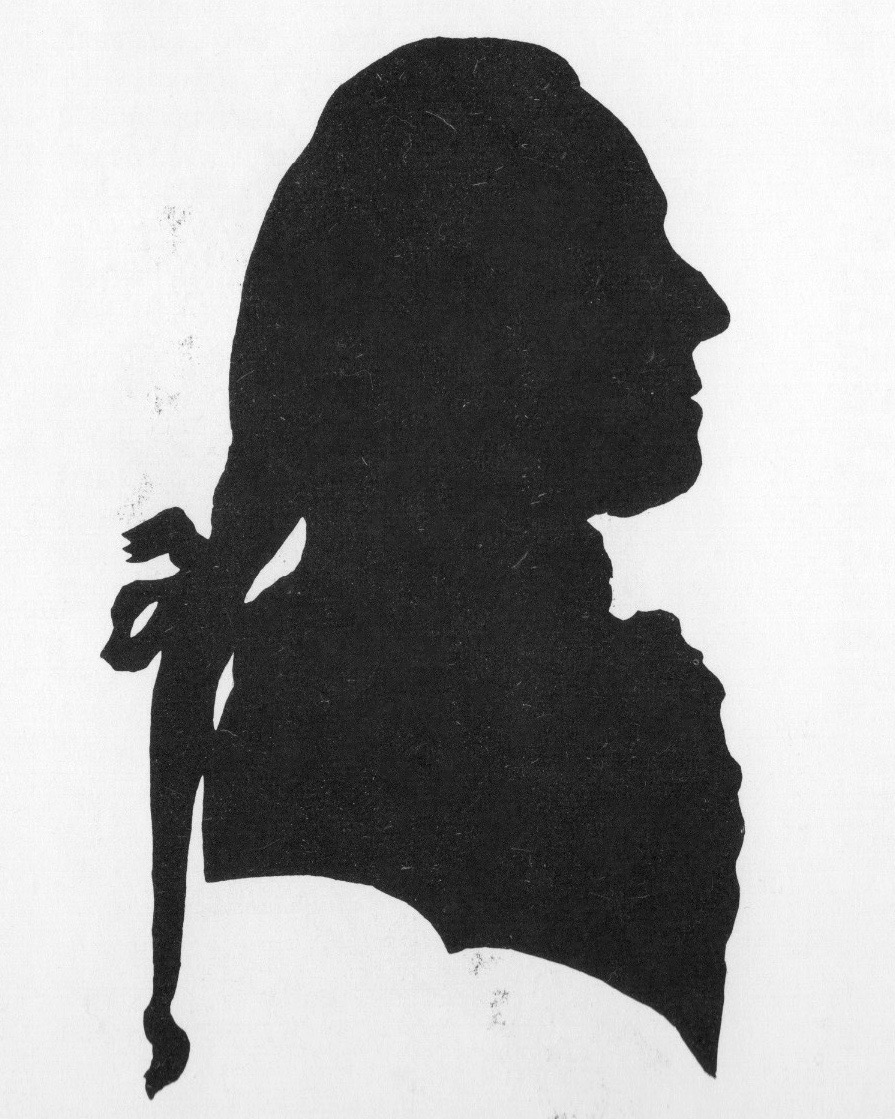 Bernhard Albrecht Moll (1743–1788): Der Botaniker Prof. Franz Joseph Märter (1753–1827). Royal Ontario Museum, Toronto.